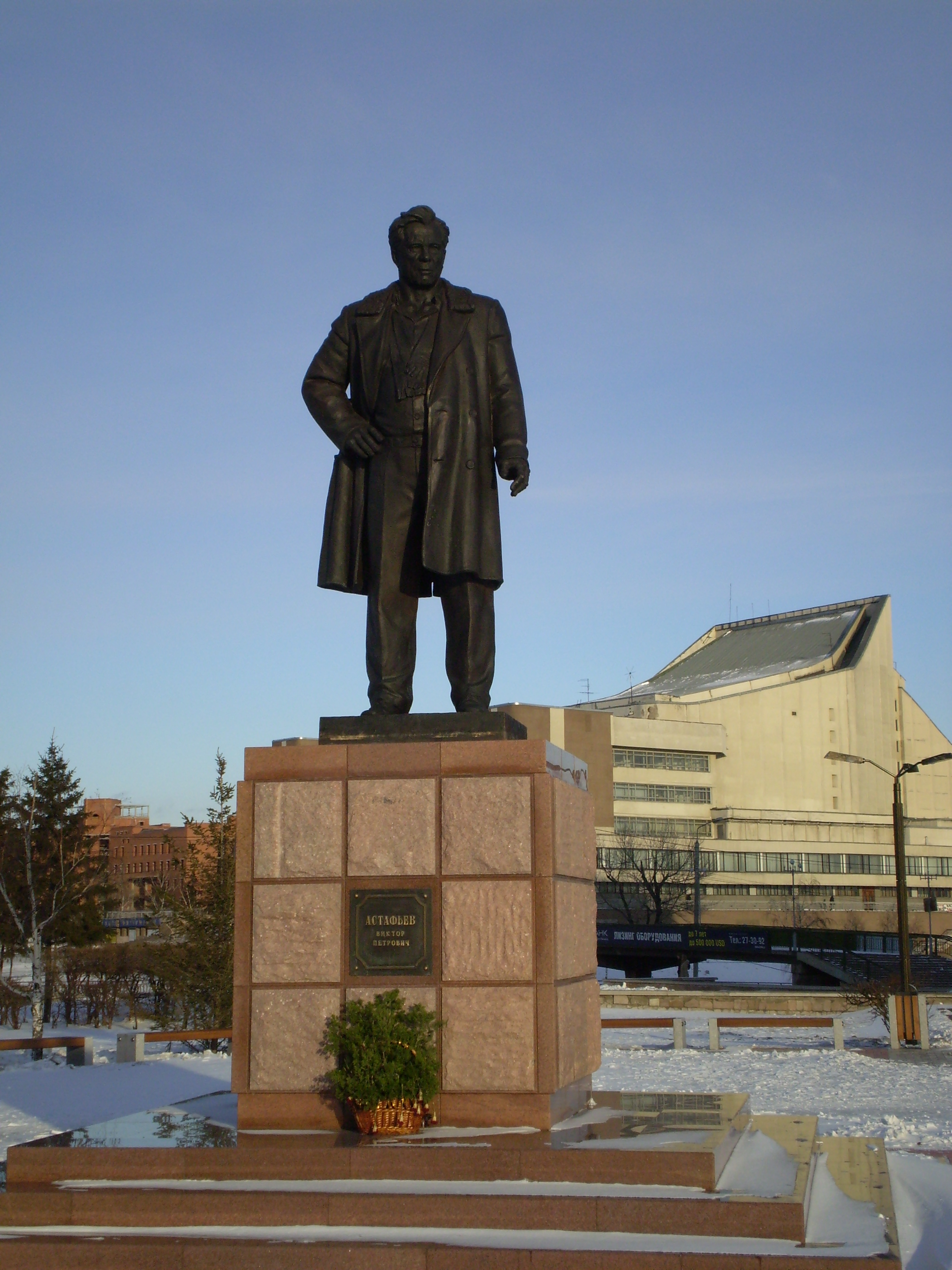 Astafiyev, V.P.